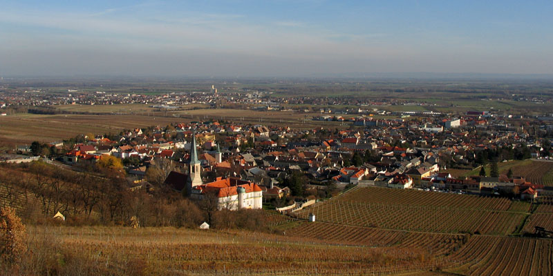 Blick über Gumpoldskirchen, Niederösterreich erstellt am 19. November 2003